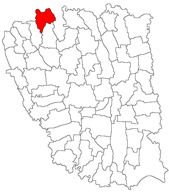 Categorie:Hărţi ale judeţului Galaţi